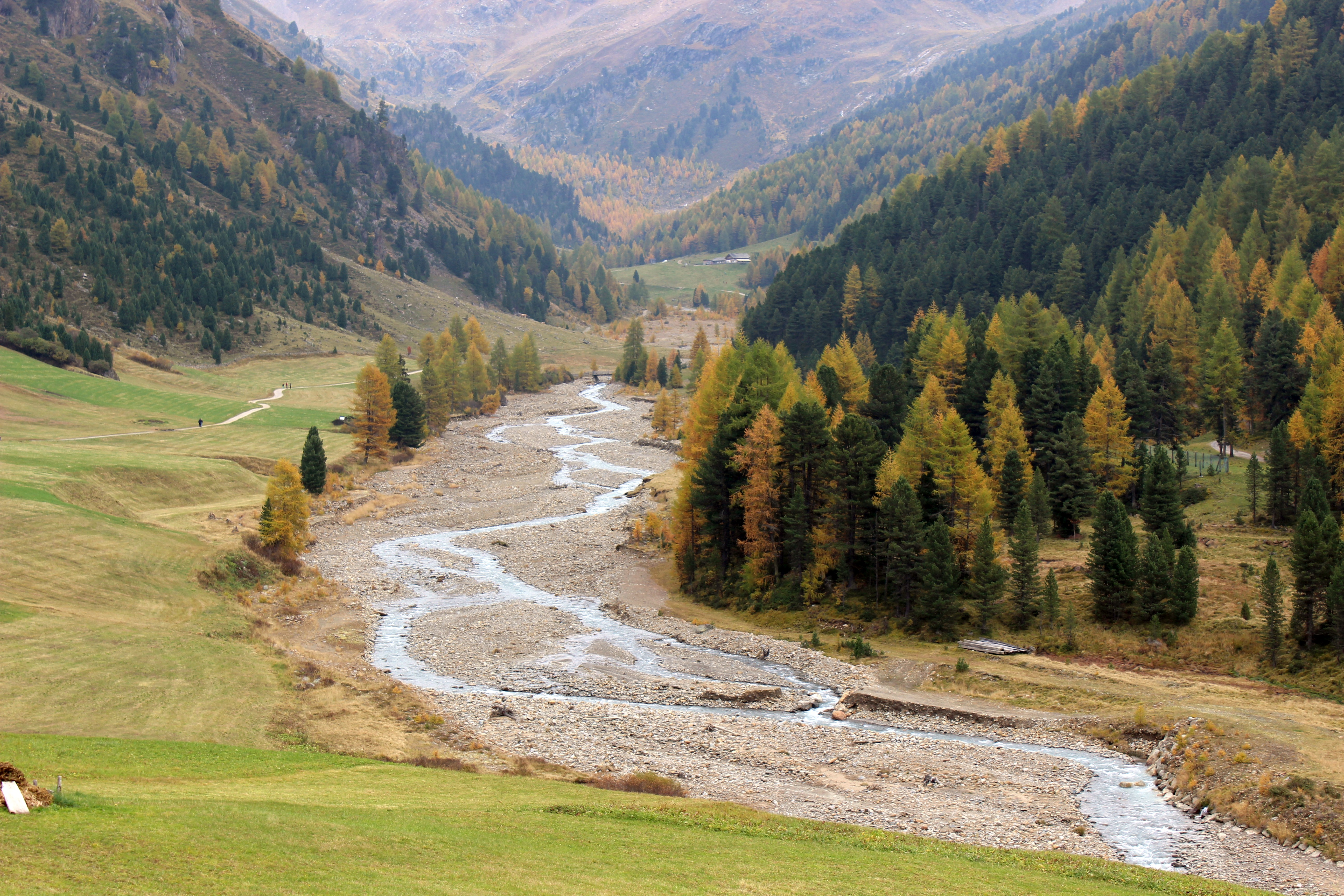 Karlinbach